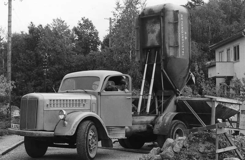 Scania Vabis L20 -46 el -47 - AB Betongindustri